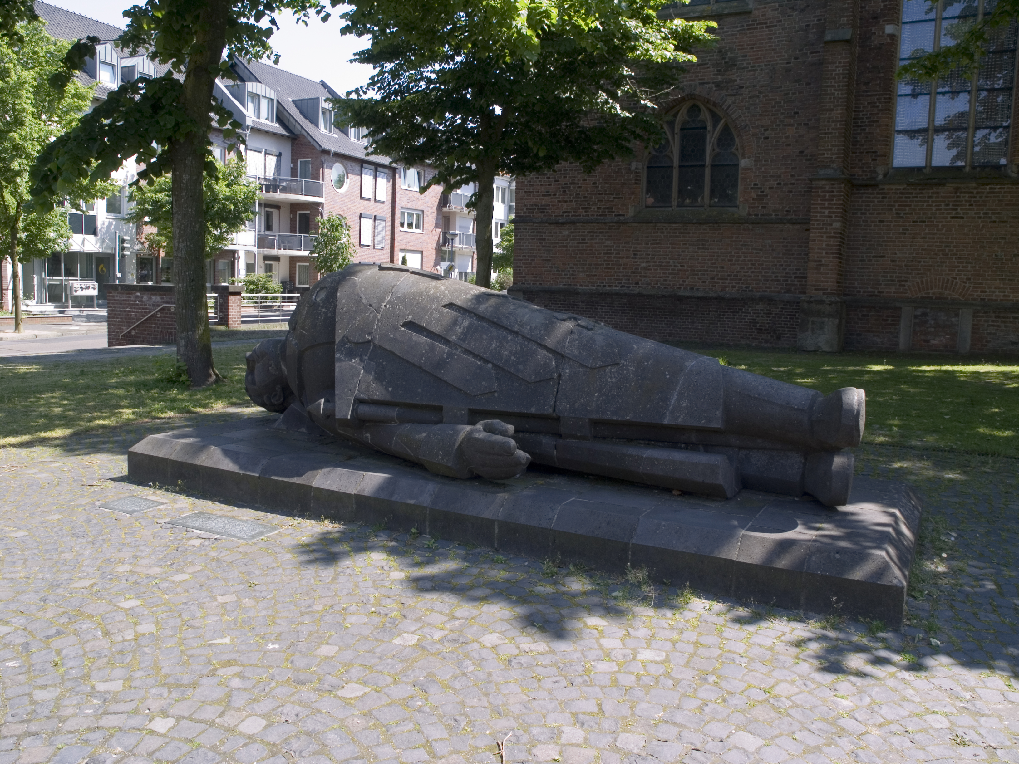 Северный Рейн-Вестфалия, Клеве – площадь Kleiner Markt, памятник Мёртвому воину